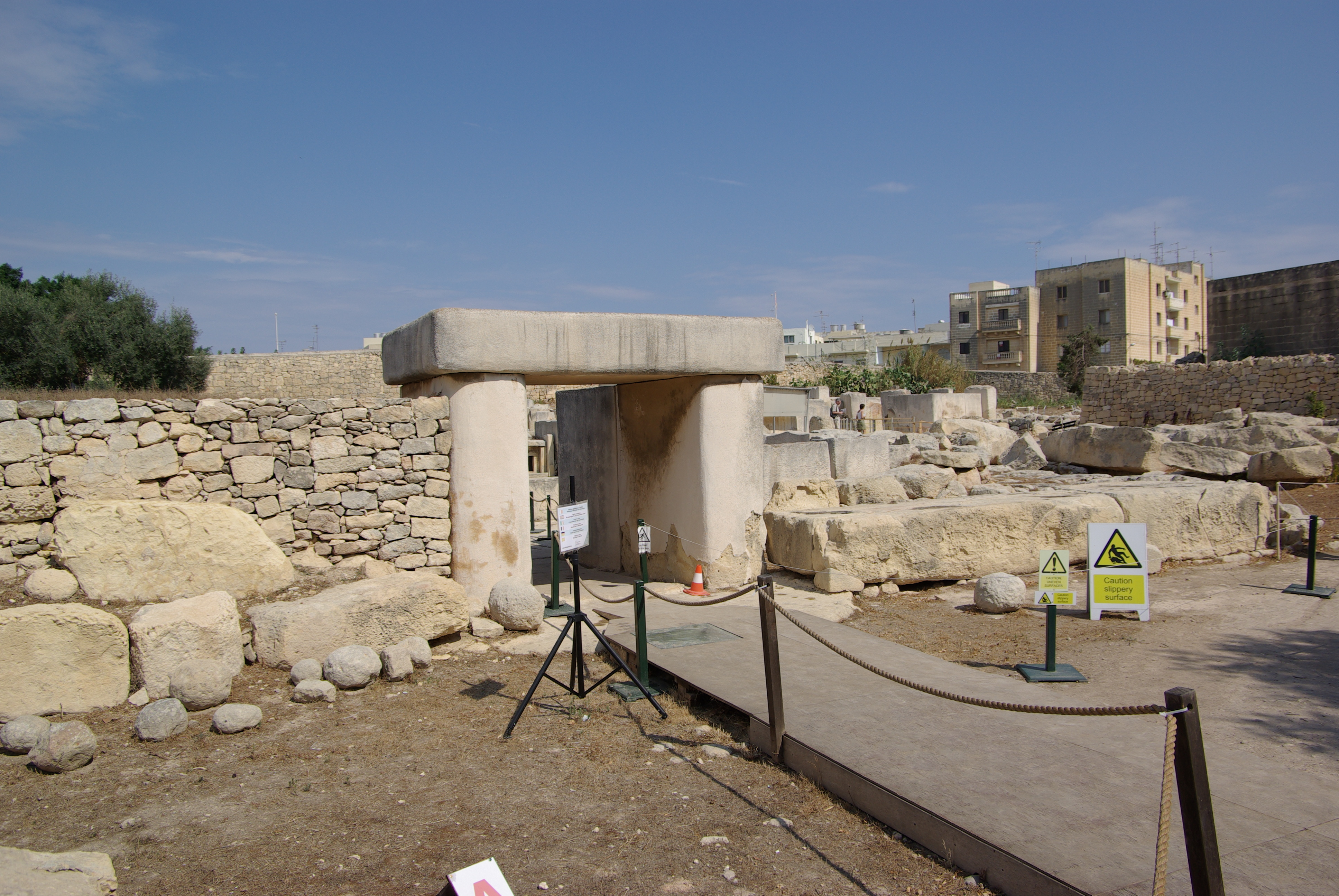 Malta, Tempel von Tarxien, Rekonstruktion des Tempeleingangs.